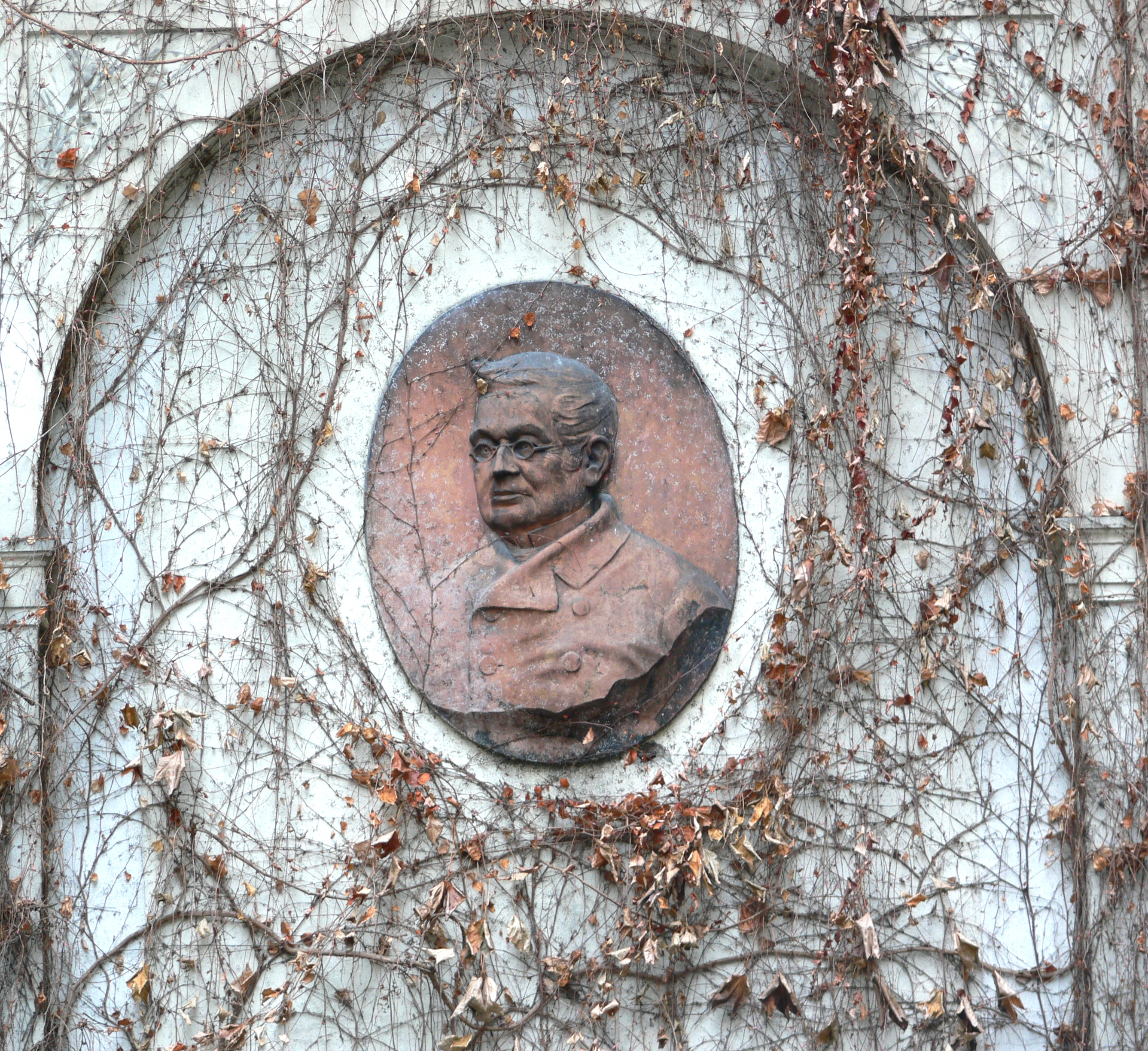 Adolphe Thiers, mémorial au square Thiers, XVI. arr., Paris